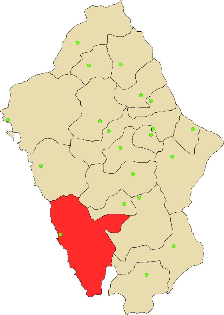 Provincia de Huarmey de departamento Ancash